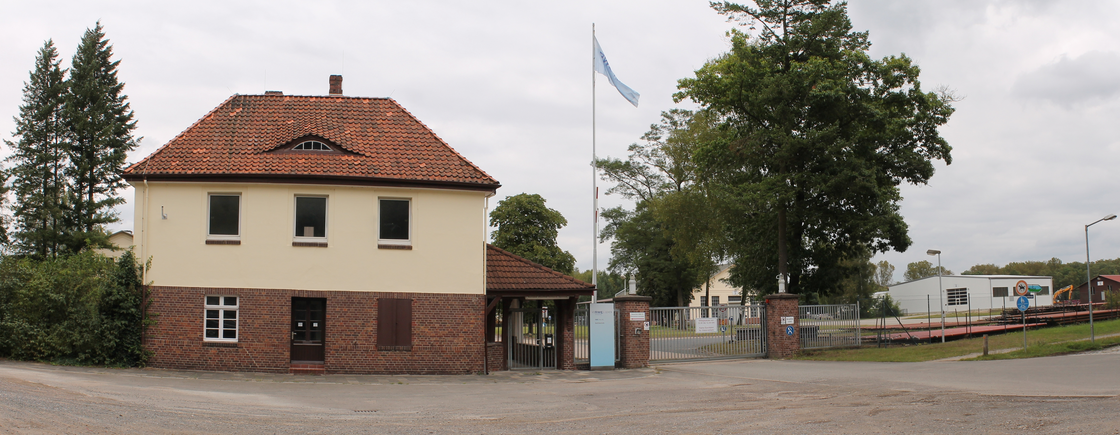 Eingang des ehemaligen Erdölbergwerks Wietze, jetzt DEA Bohrbetrieb in Wietze, Niedersachsen, Deutschland.